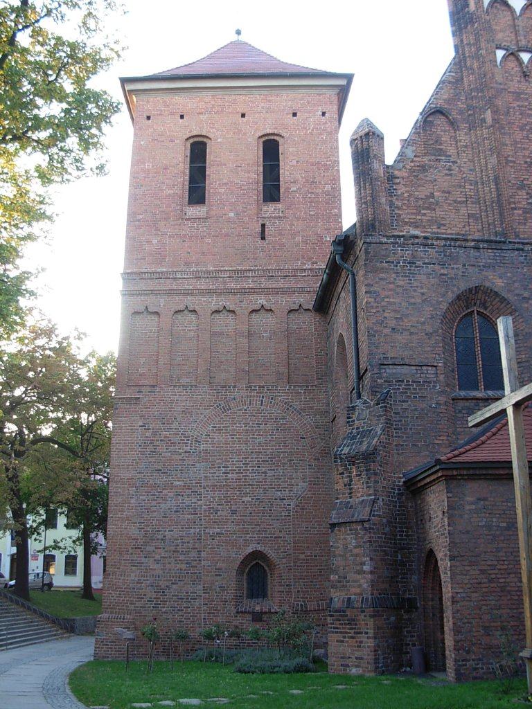 Katedra Bydgoska